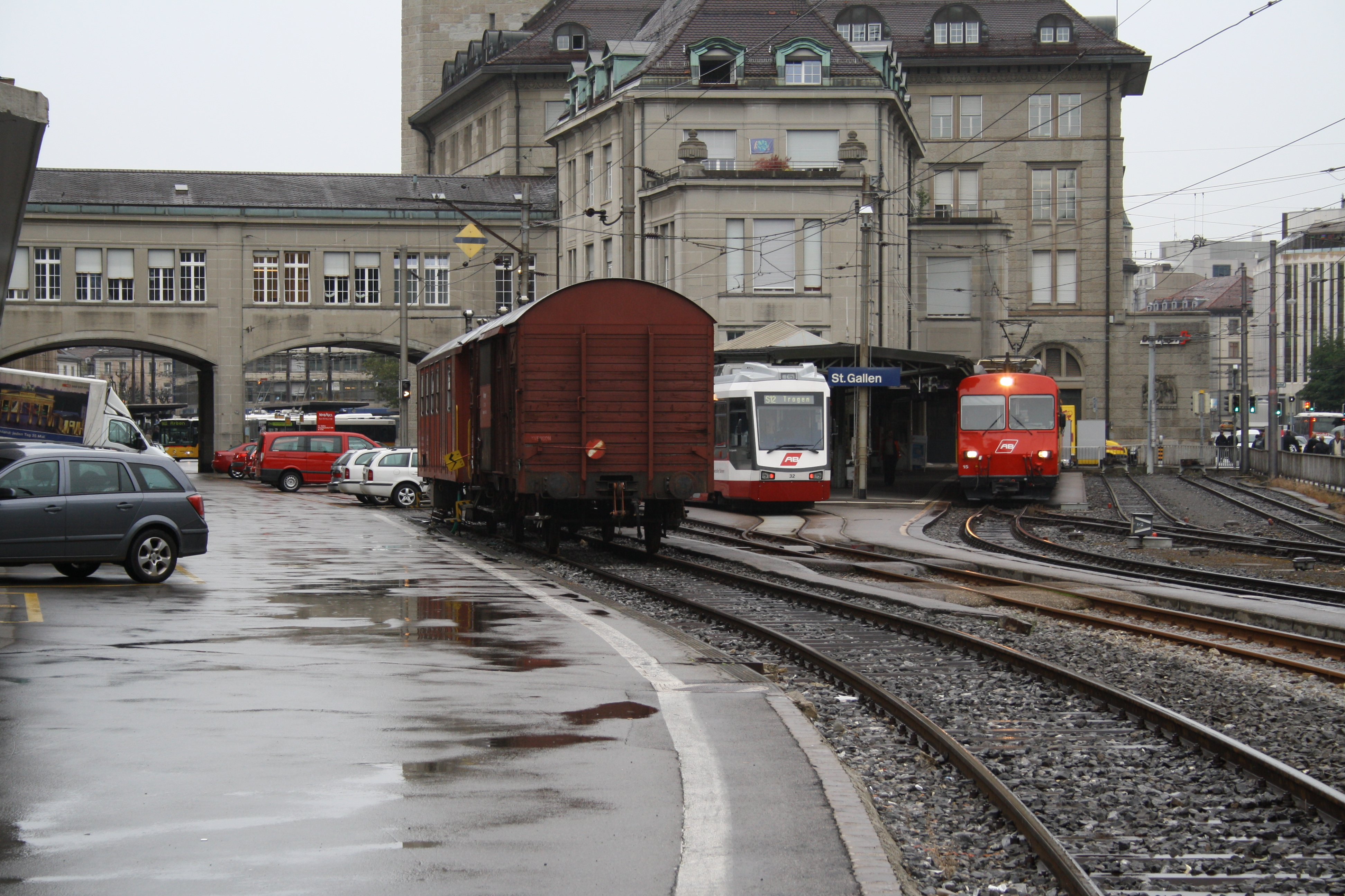 Bahnhof St. Gallen Schmalspur